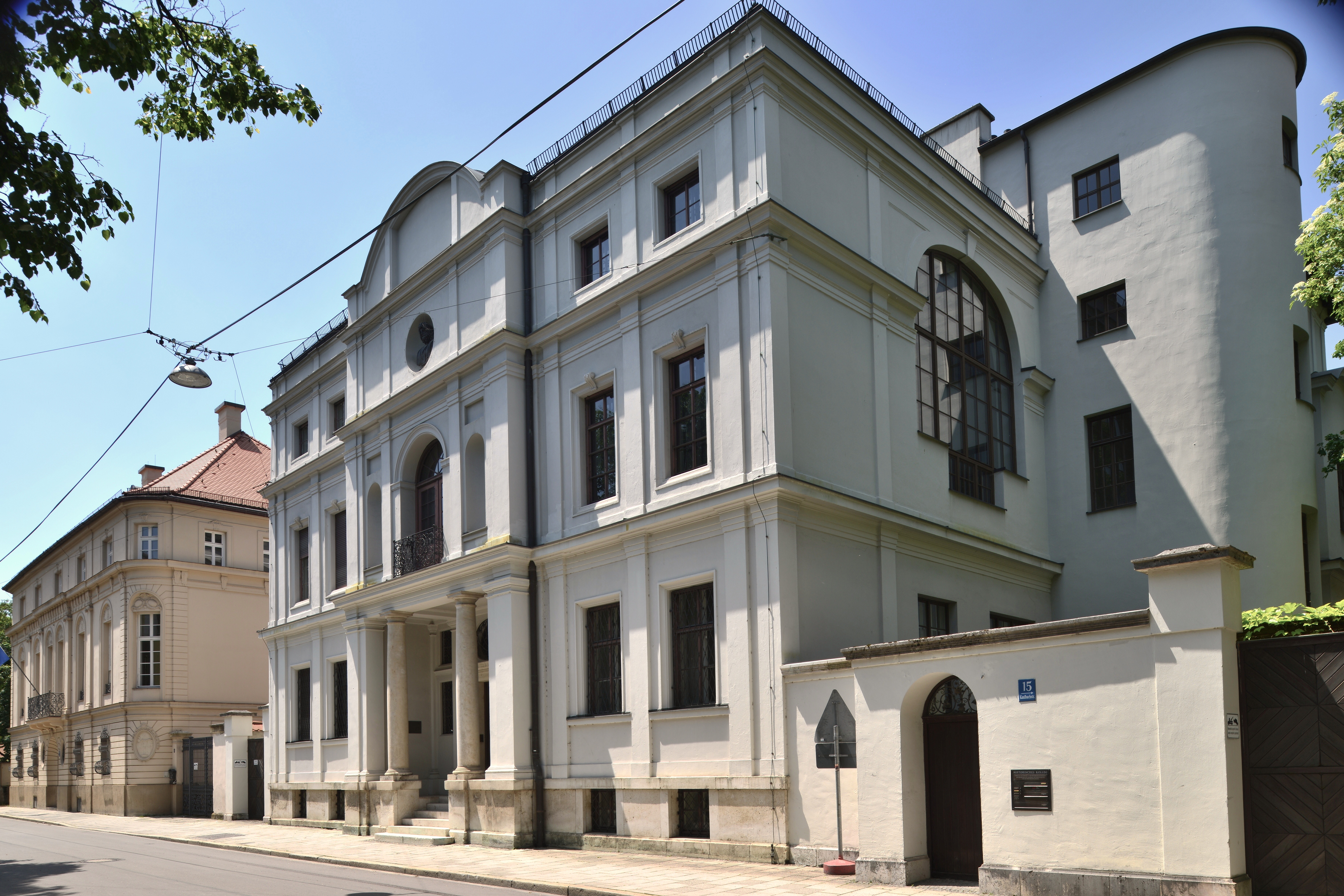 München. Fassadenansicht Kaulbachstraße 15.